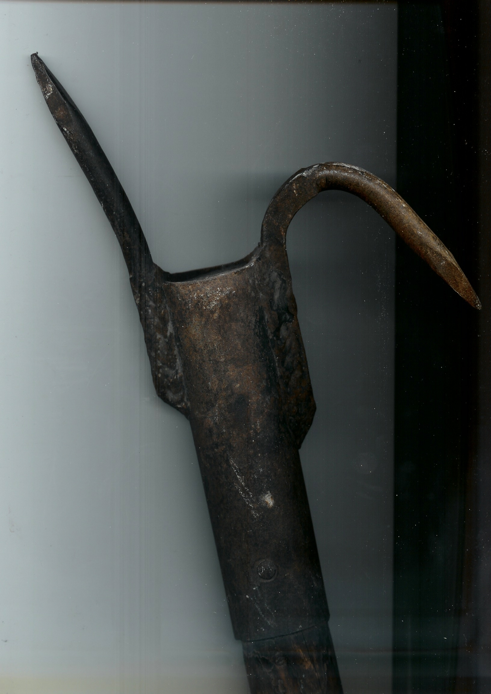 Historischer Einreißhaken 18. bis 19. Jahrhundert, Süddeutschland. Geschmiedetes und geschweisstes Eisen an einer Stange aus Tannenholz.